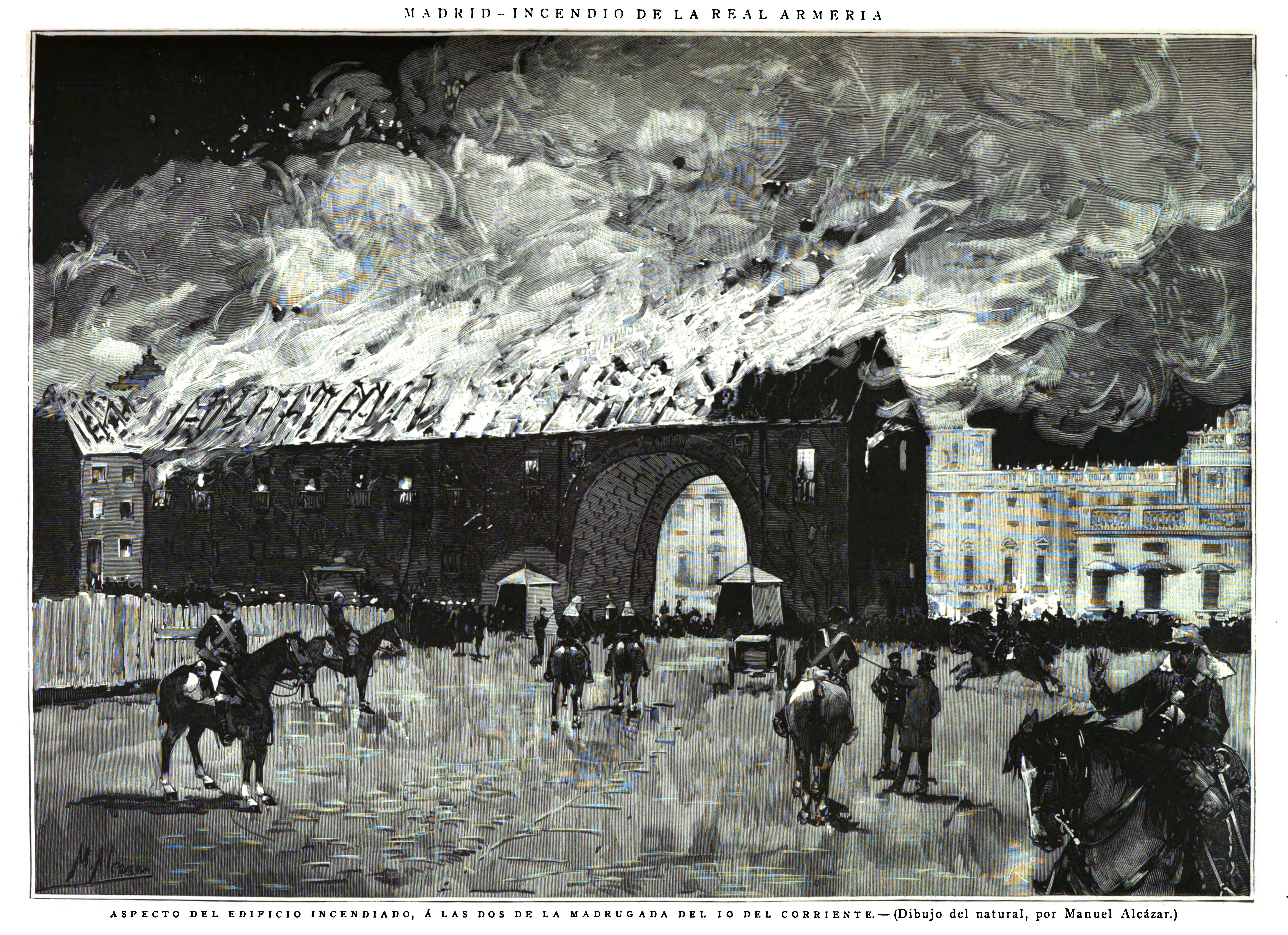 «Madrid — Incendio de la Real Armería». Aspecto del edificio incendiado, á las dos de la madrugada del 10 del corriente (Dibujo del natural, por Manuel Alcázar